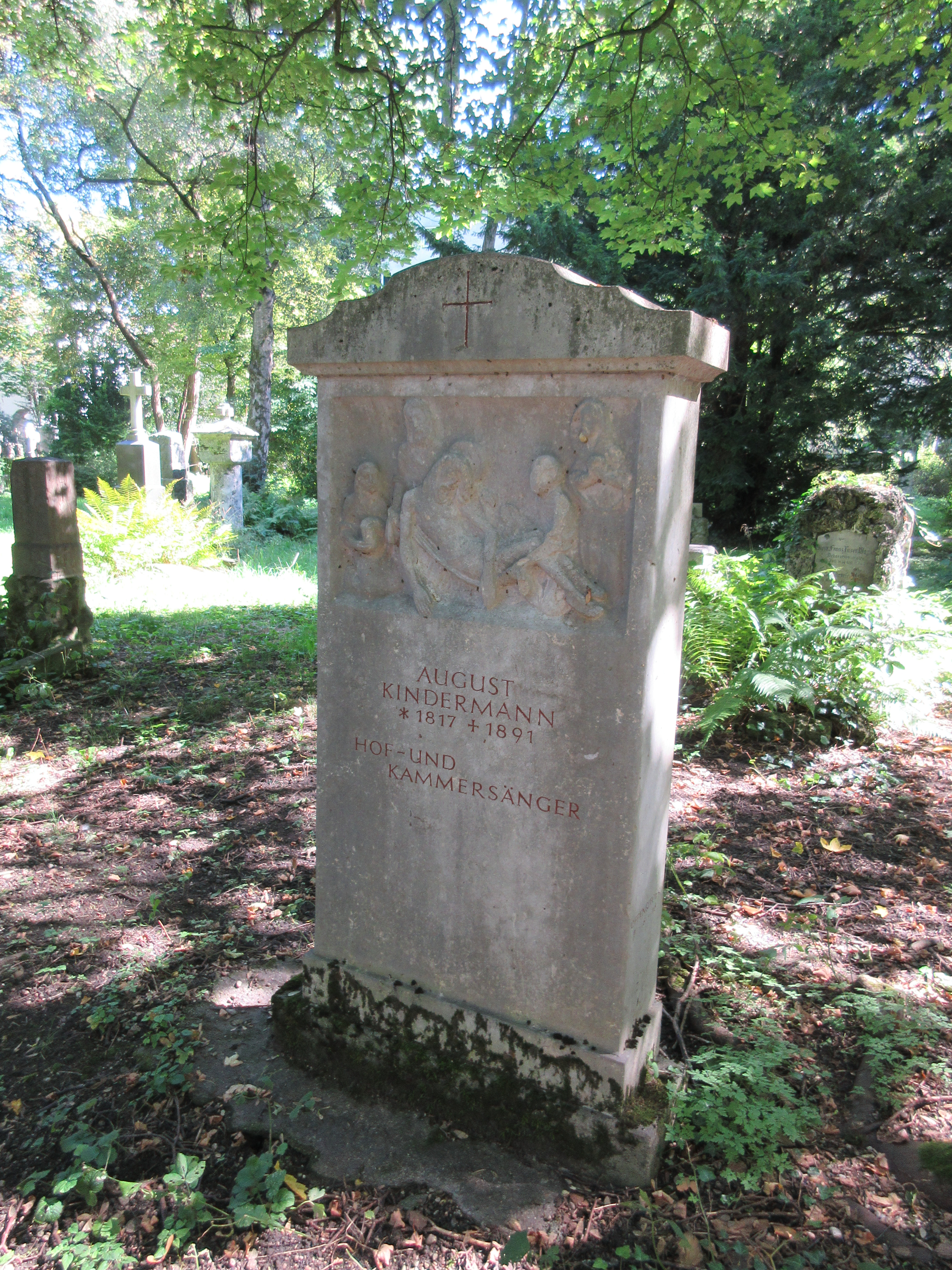 Grab von August Kindermann auf dem Alten Suedlichen Friedhof in Muenchen-Graeberfeld GF-8-8-46